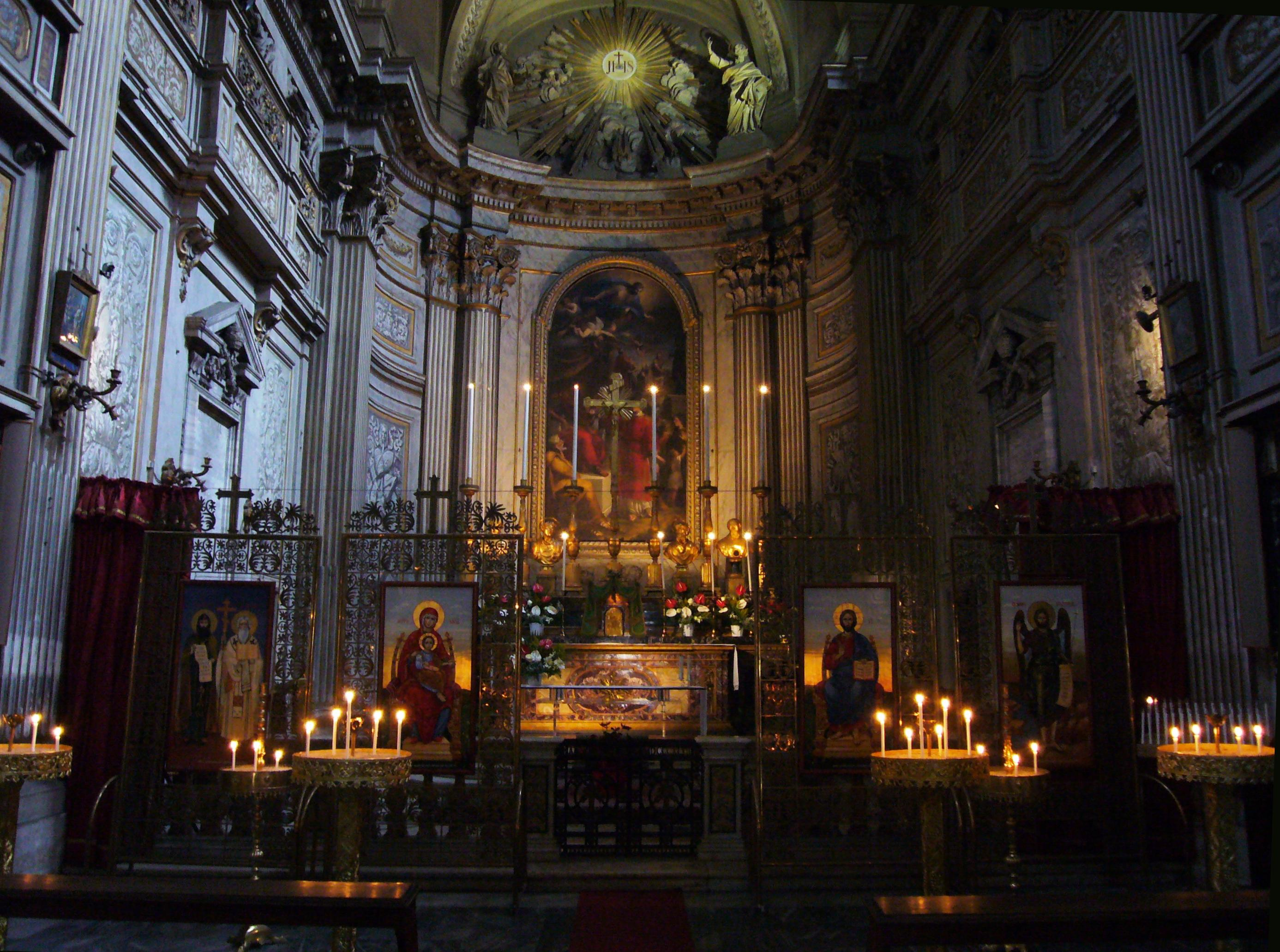 Roma, ss. Vincenzo e Anastasio: altar maggiore e iconostasi